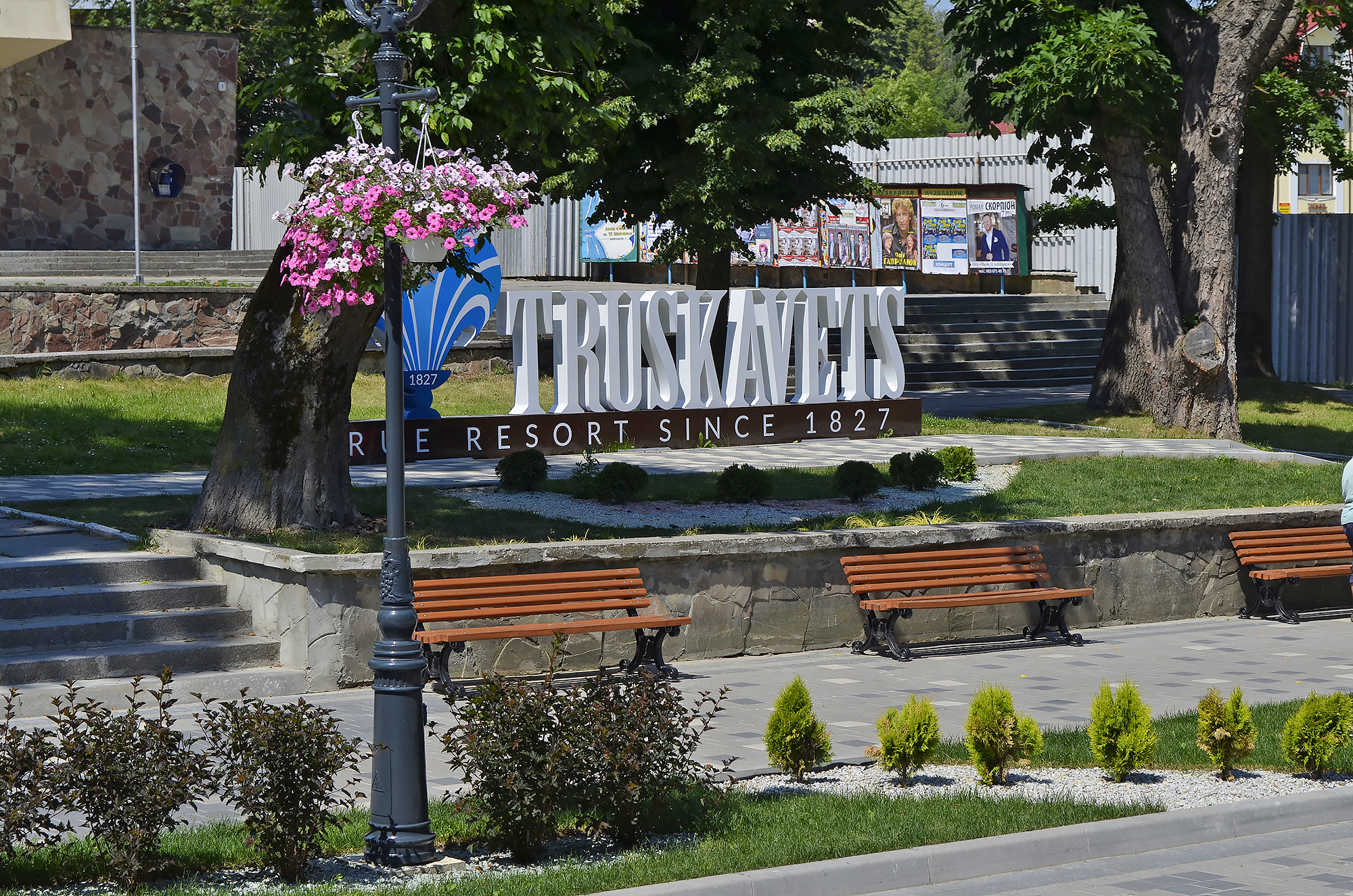 Пешеходный проспект в Трускавце с популярным местом для фотографий